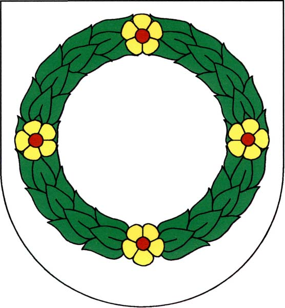 Znak obce Lásenice